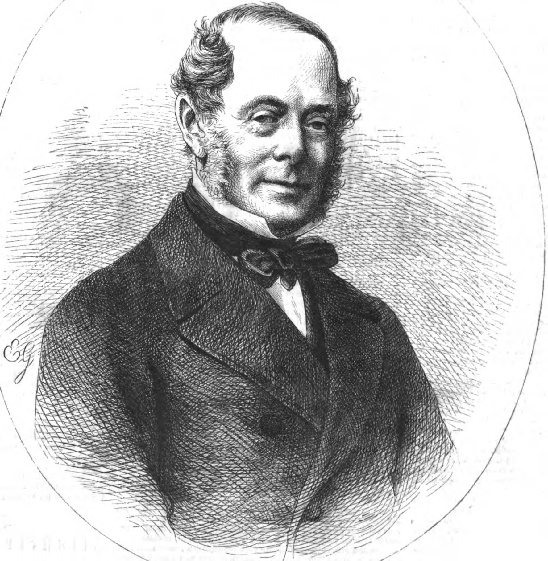 George William Frederik Villiers, Graf Clarendon, englischer Staatssekretär des Auswärtigen, 1865.